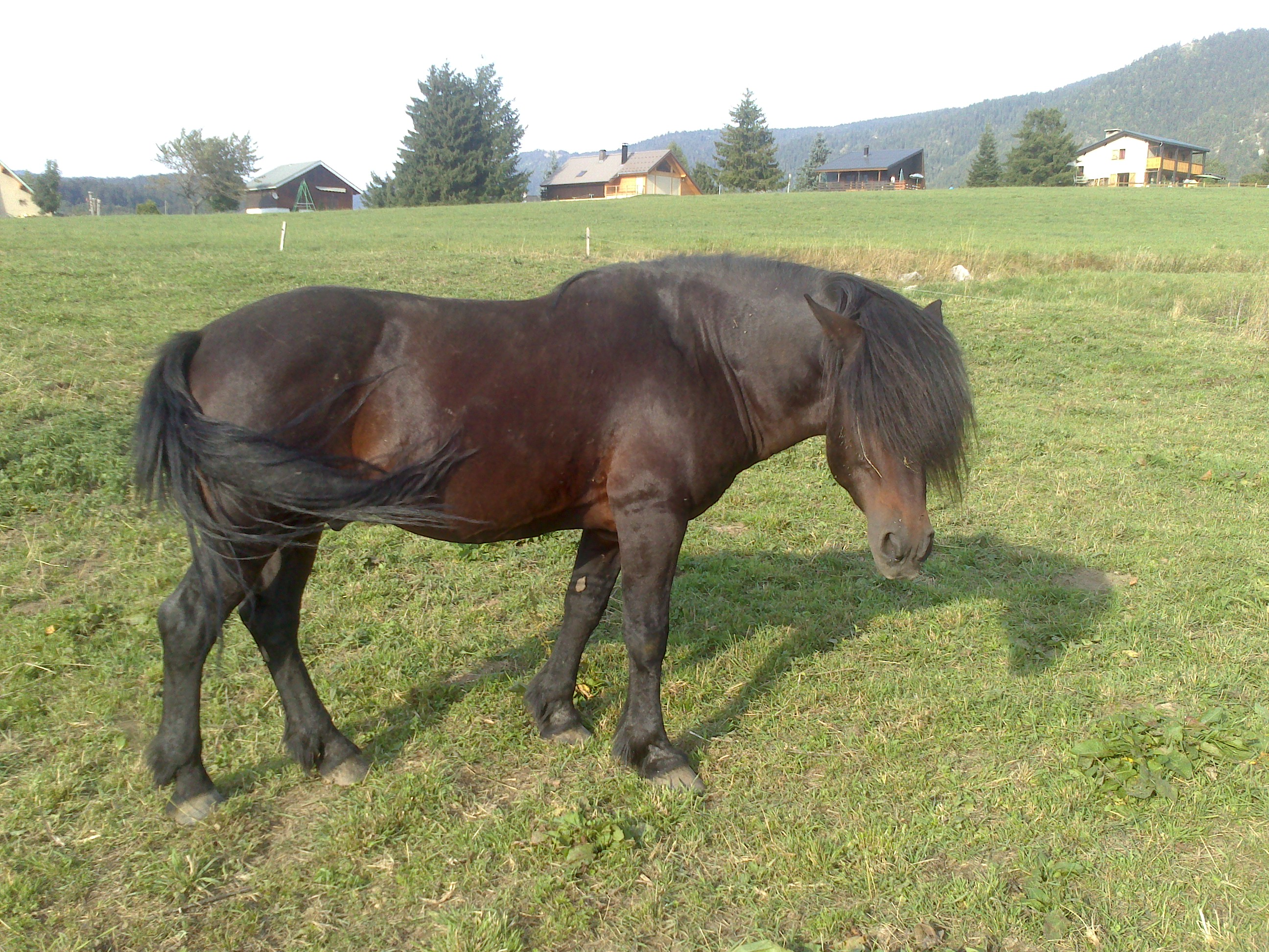 Cheval Barraquand à Autrans (Isère, Rhône-Alpes, France)